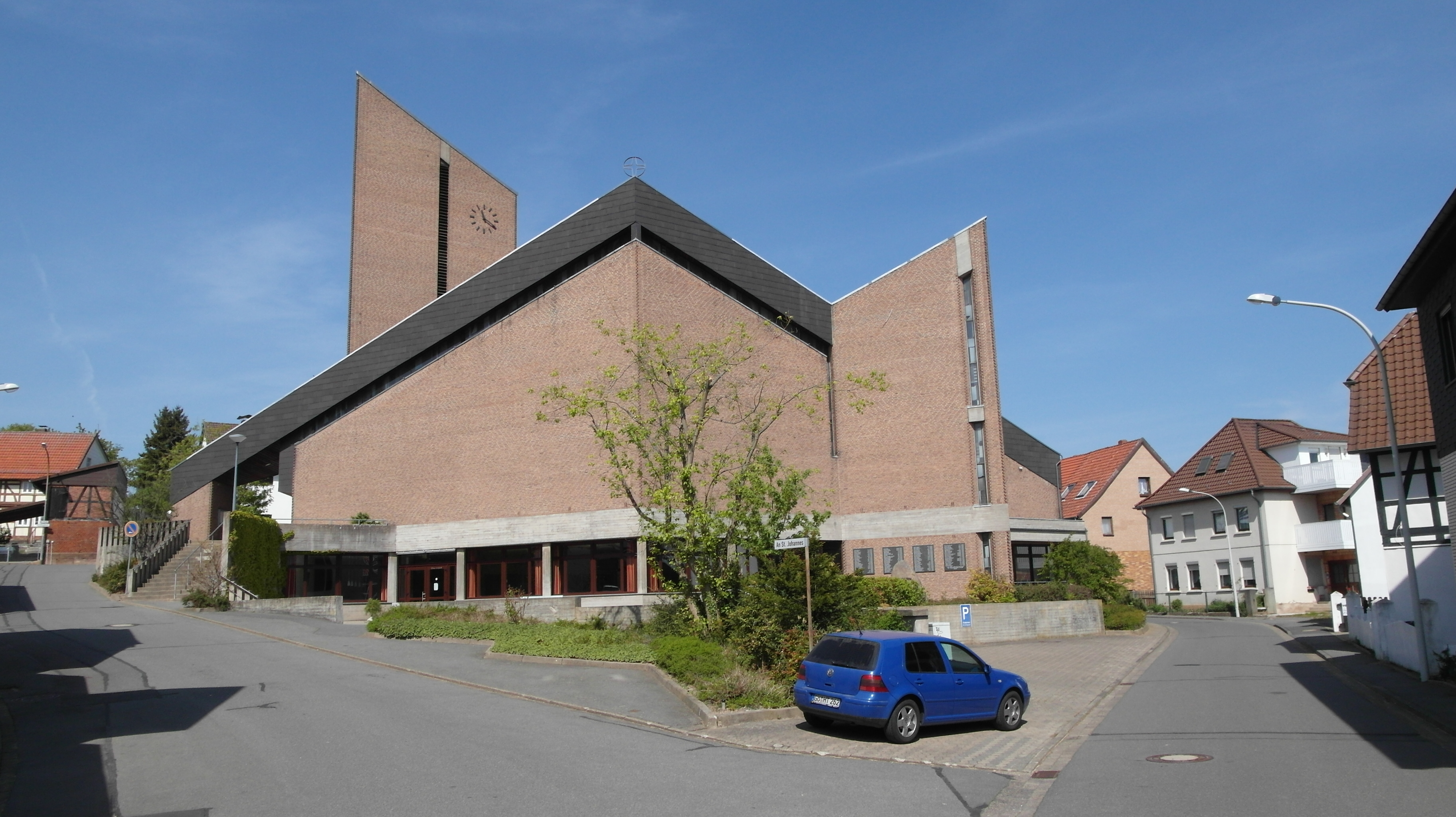 Kath. Pfarrkirche St. Johannes Baptist in Hilkerode (Duderstadt)